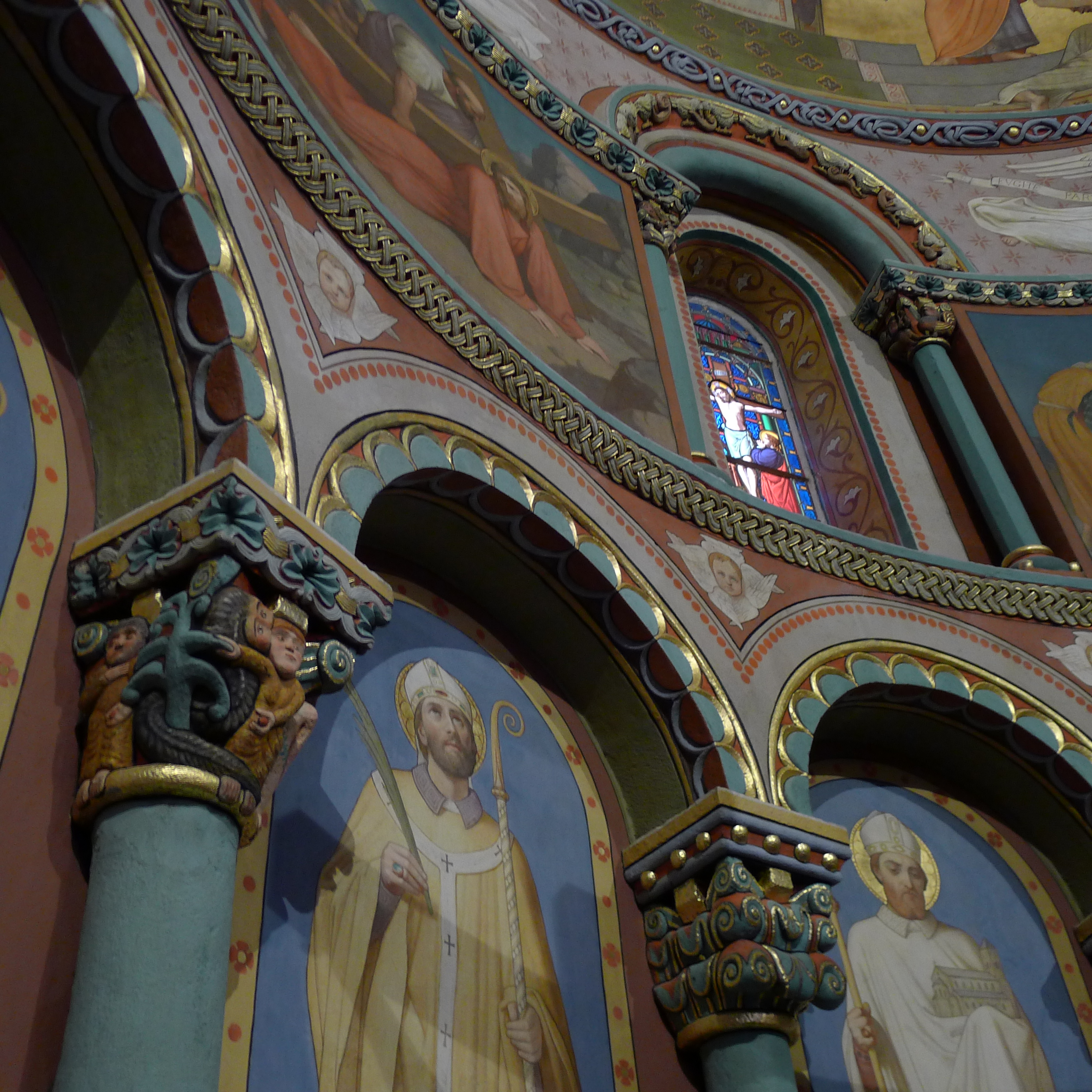 Détail des sculptures polychromes du choeur